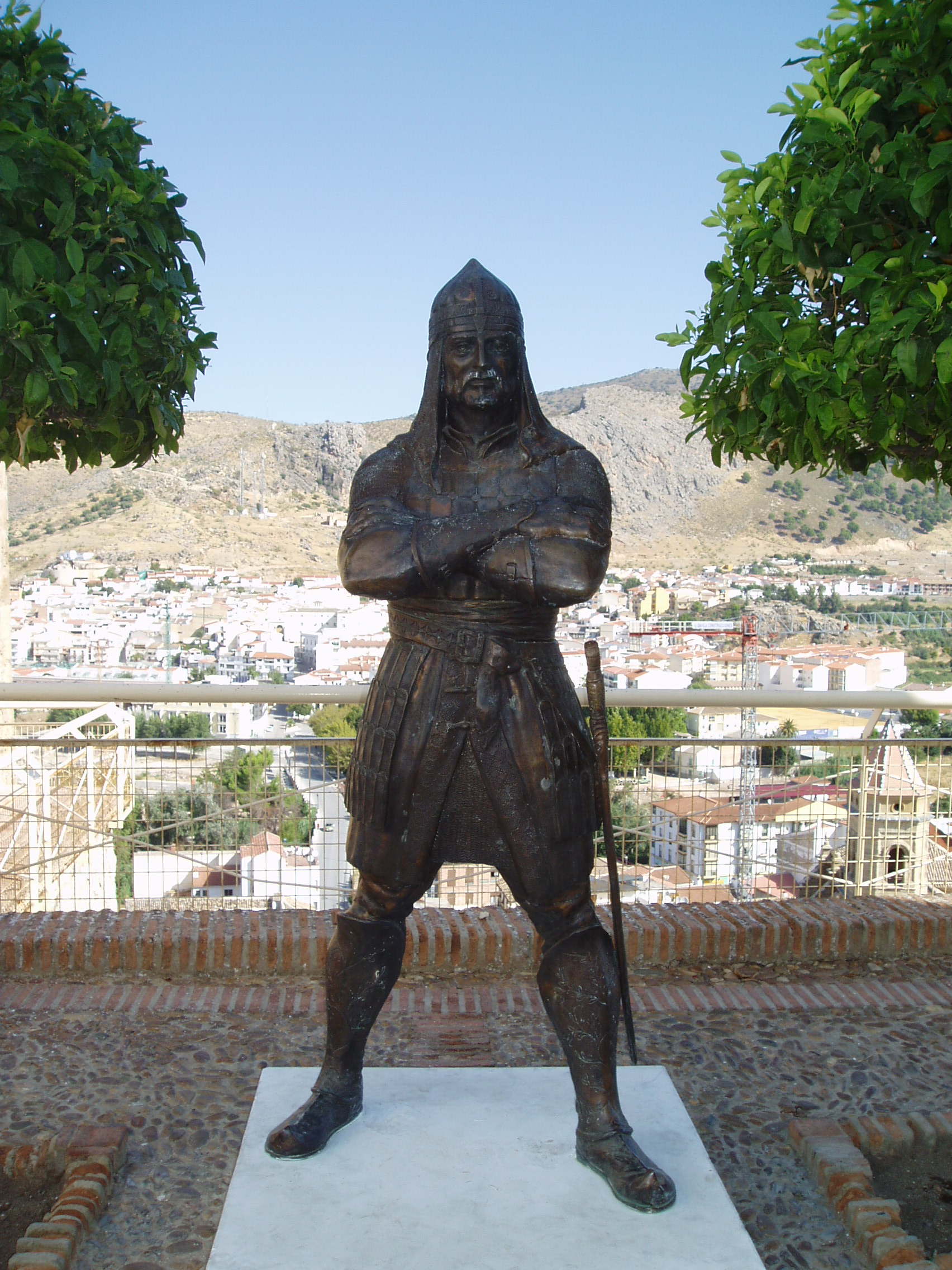 Estatua en Loja (provincia de Granada) de Aliatar, alcaide durante la etapa nazarí (s. XV) y suegro del rey Boabdil.